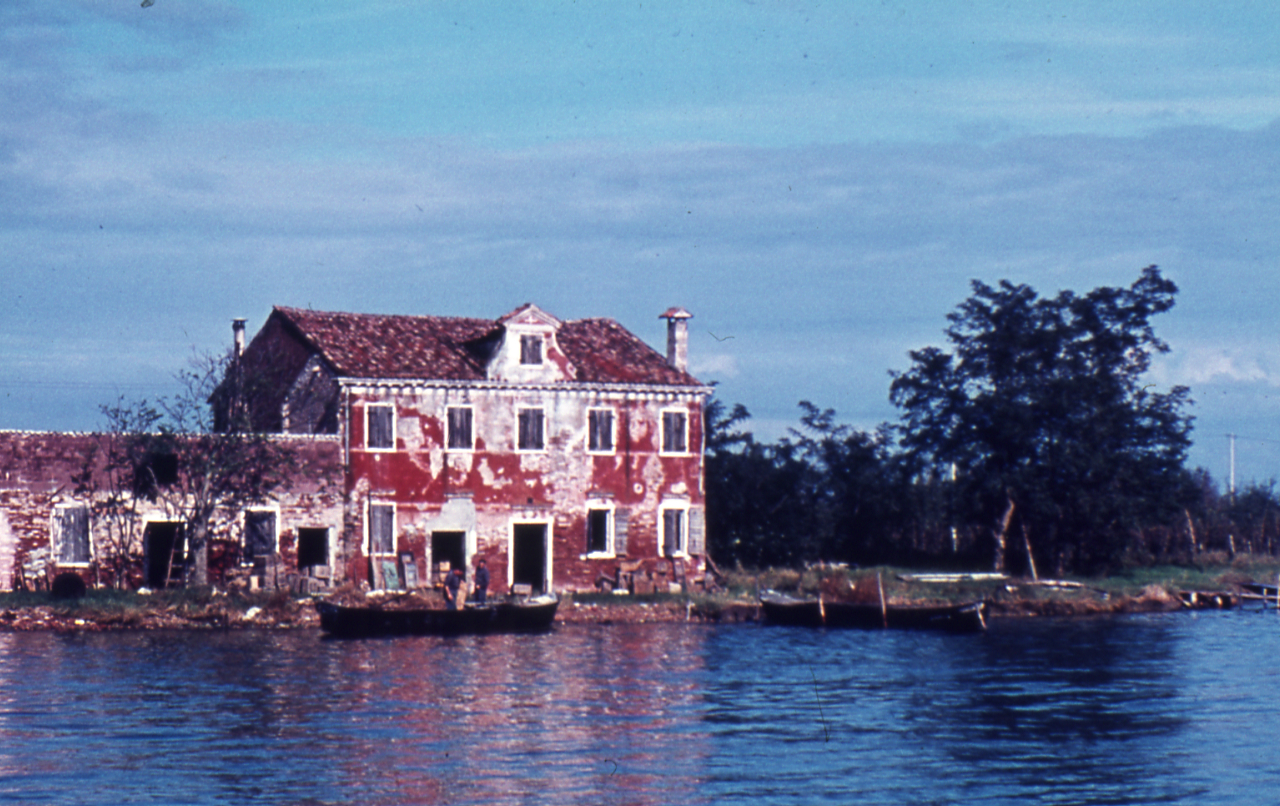 Serie fotografica : Italia, 1982 / Paolo Monti. - Foglio: 1, Fotogrammi complessivi: 2/20 : Diapositiva, sviluppo cromogeno/ pellicola ; 35 mm. - ((Le diapositive nn. 01-18 costituiscono altre serie. - Fonte: Agenda di Paolo Monti: Diapositive 24x36mm (1948-1982), presso Archivio Paolo Monti